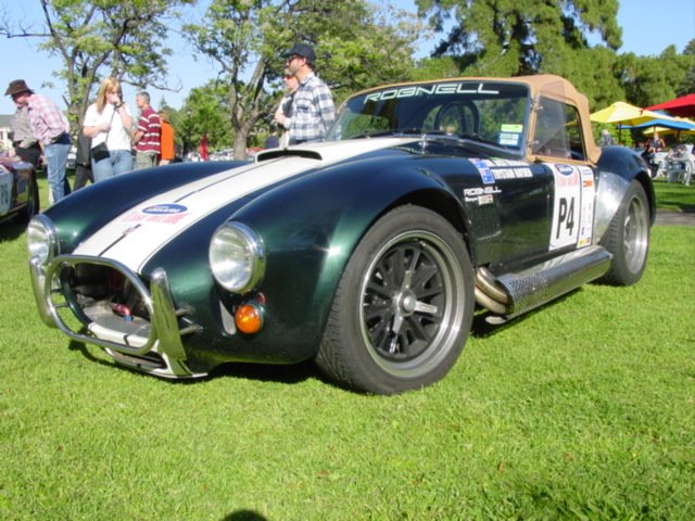 Robnell Cobra replica